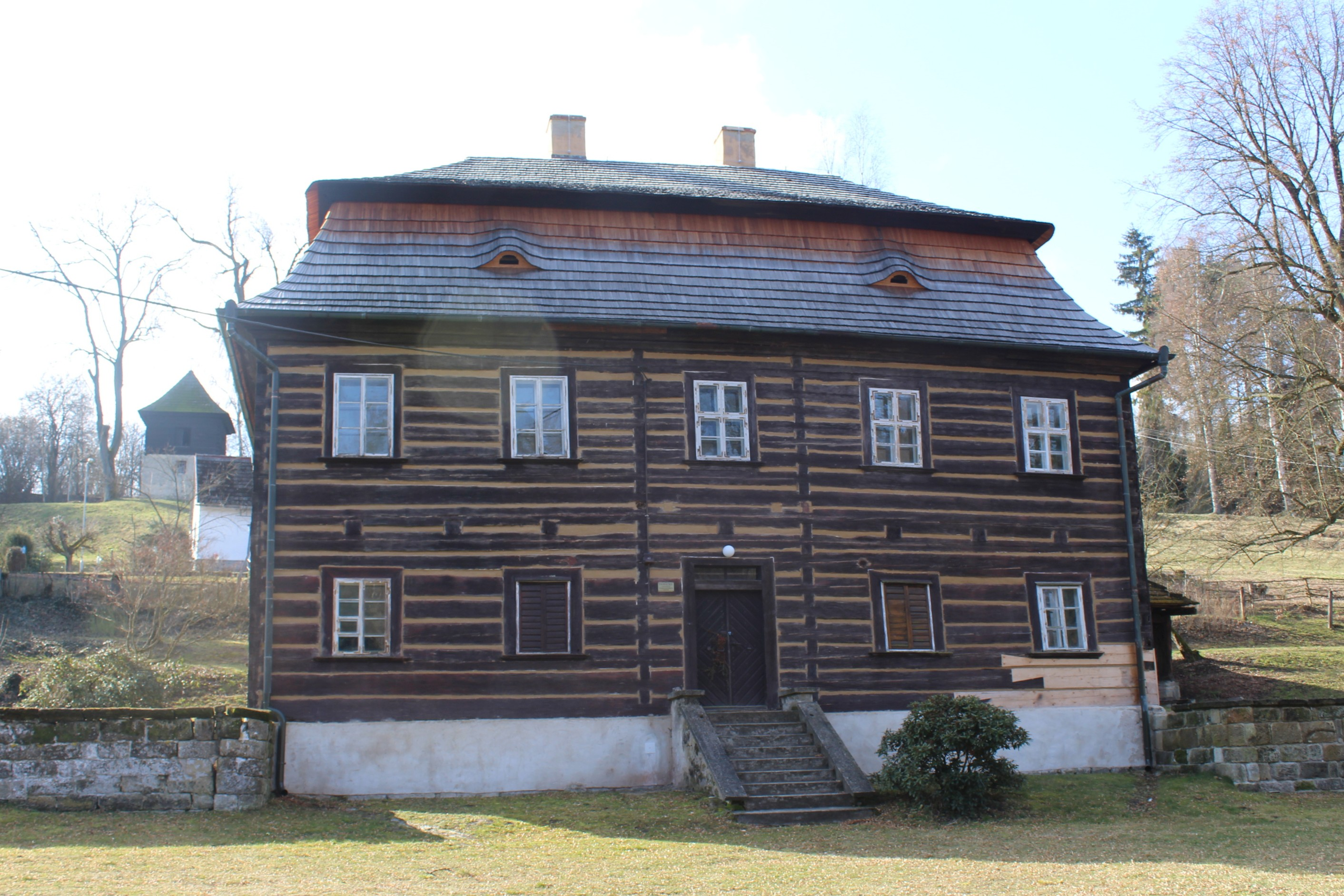 Dolní Krupá, kostel sv. Václava